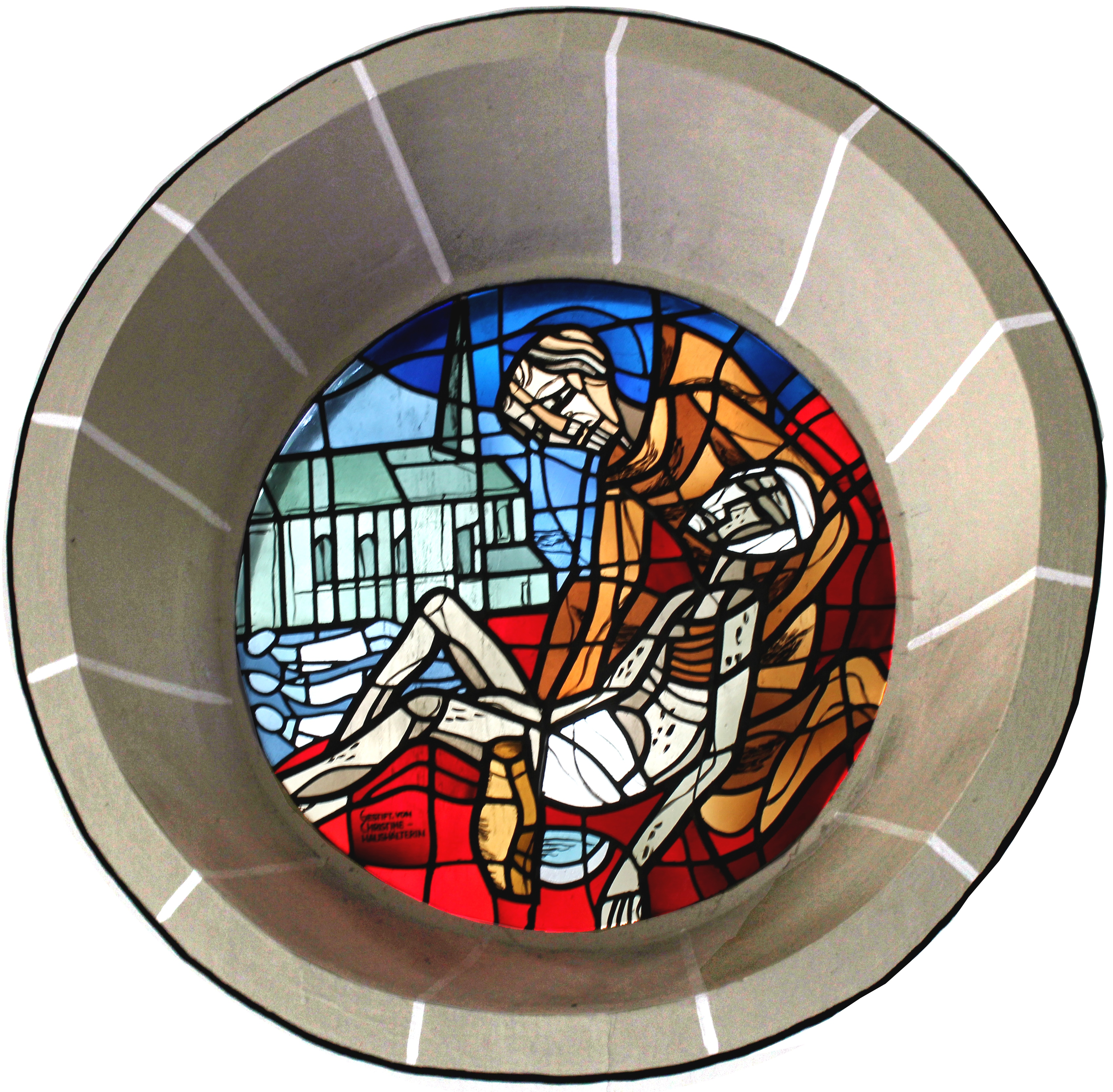 Kapelle am Guten Mann – Fenster von Werner Persy: Eremit pflegt einen Aussätzigen (Der Maler Werner Persy hat mit Schreiben vom 19. Oktober 2009 die Genehmigung zur Veröffentlichung des Bildes unter CC-BY-SA-Lizenz erteilt.)